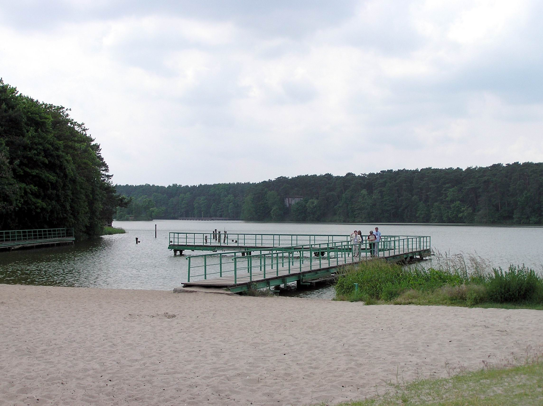 Soczewka, gmina Nowy Duninów